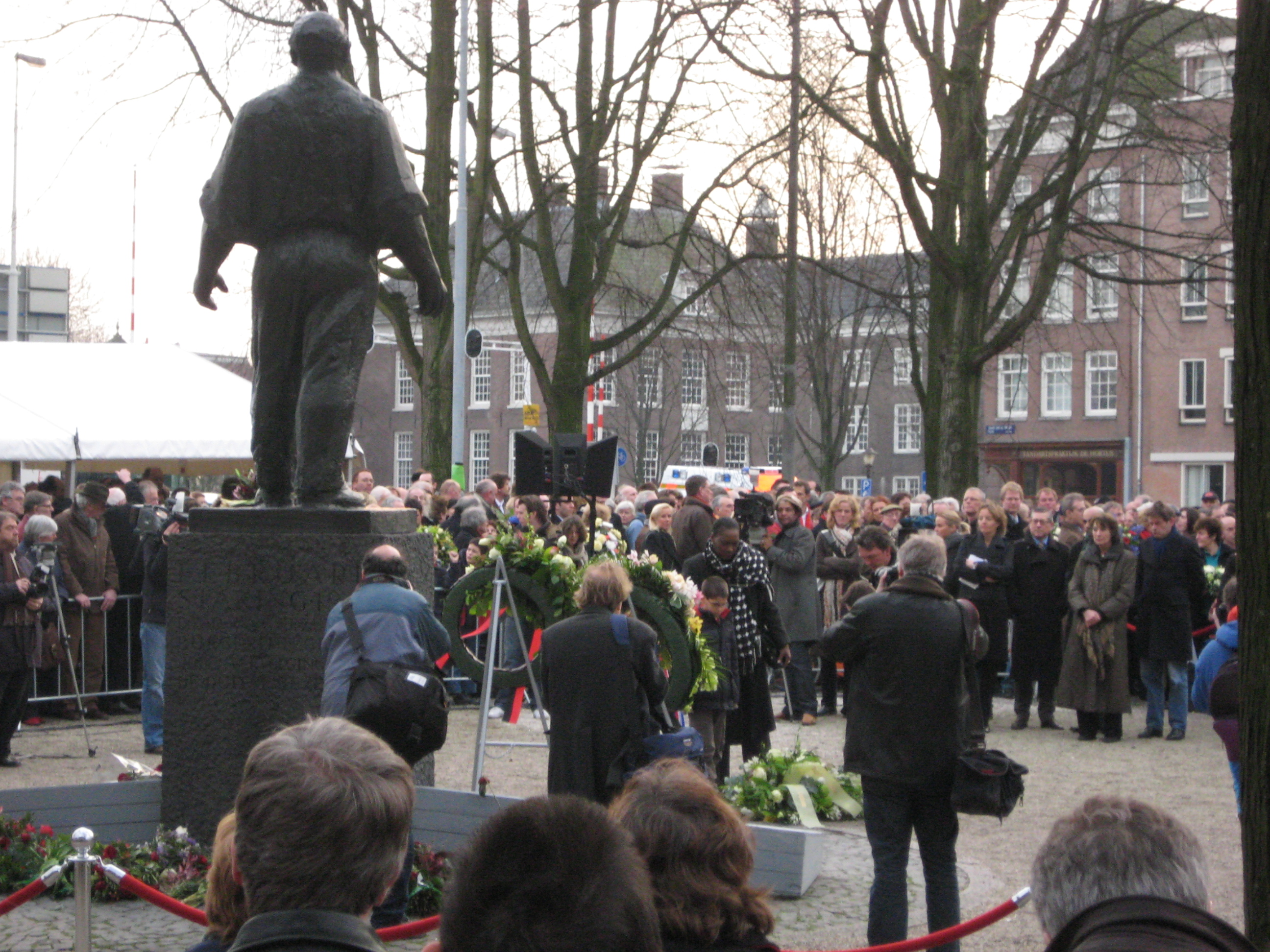 Februari staking 2008